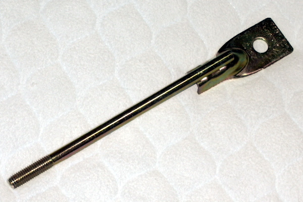 羽子板ボルト_M12_01